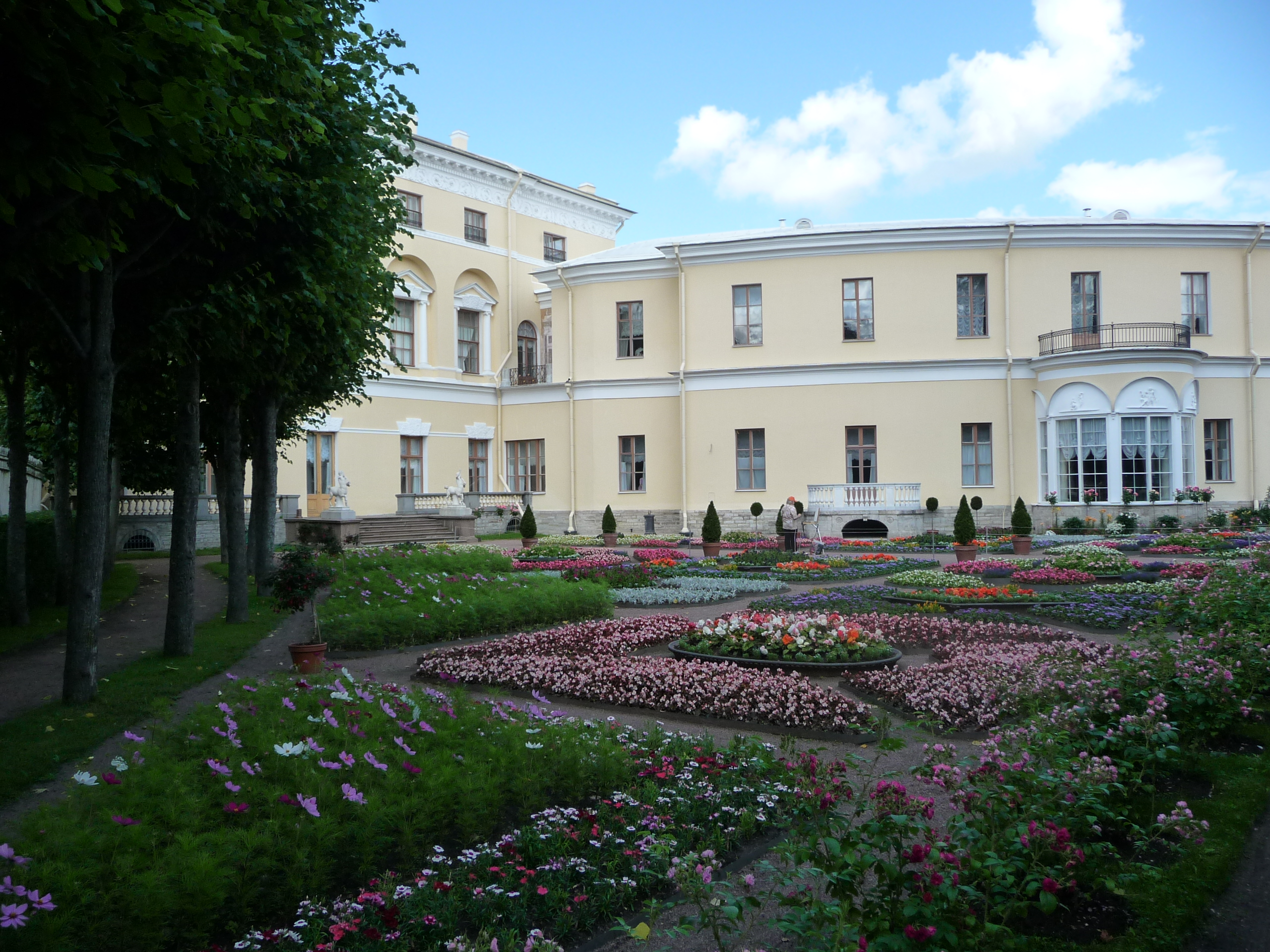 Palace-p1030791.jpg